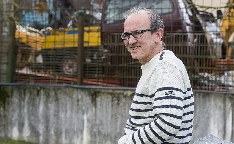 Xabier Mendiguren Elizegi idazlea eta editorea. Argazki Press / Luis Jauregialtzo.